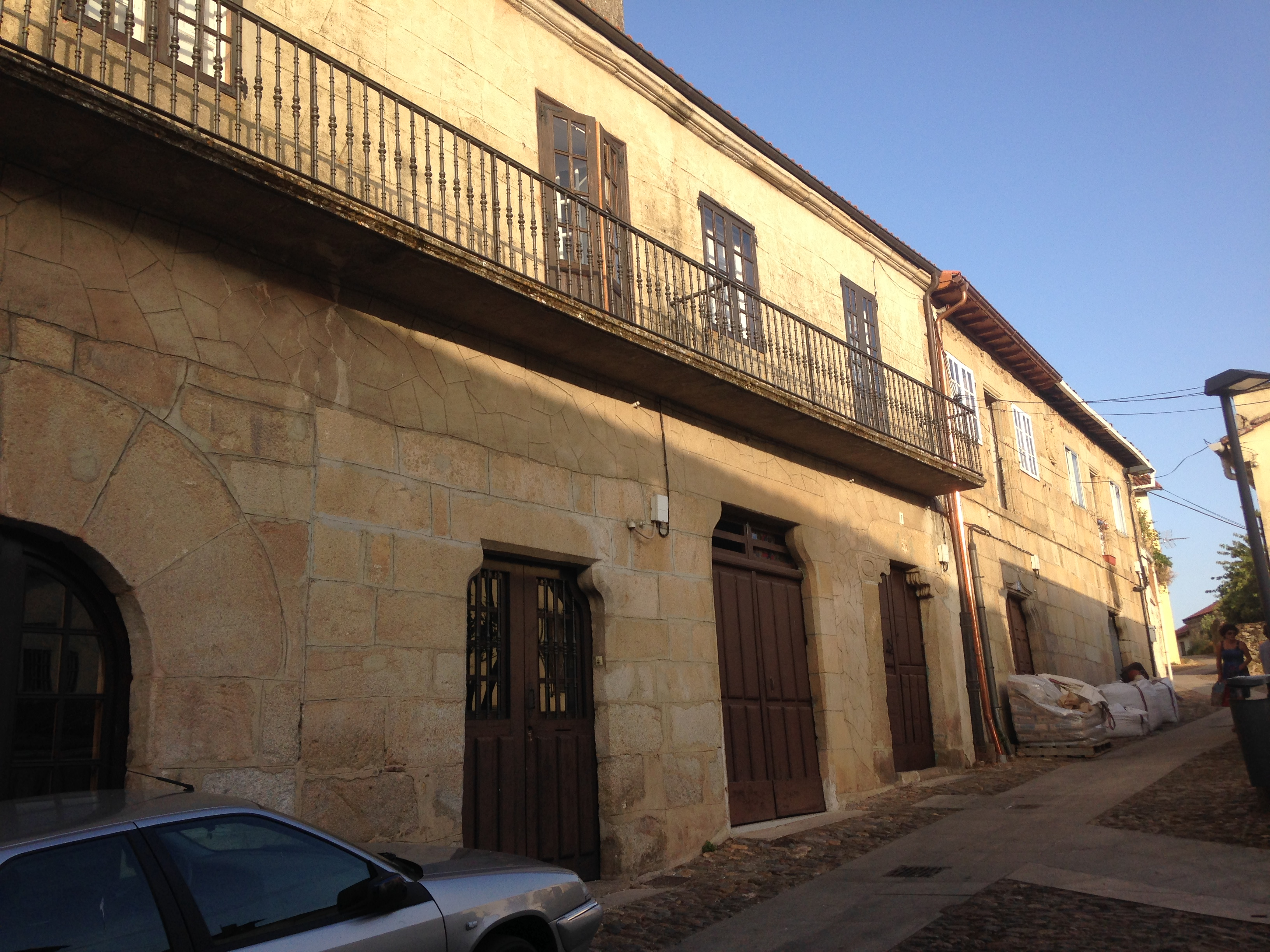 Casas dos Gaibor nas inmediacións da Porta da Alcazaba (Monforte de Lemos).